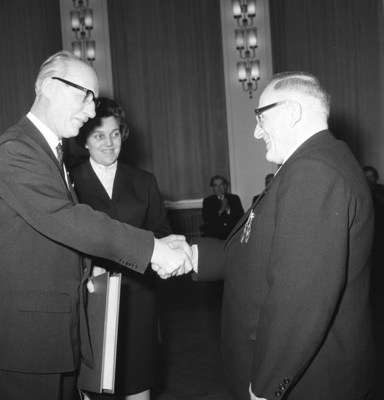 Zentralbild/Junge, 2.3.1962 Verdiente Persönlichkeiten mit hohen staatlichen Auszeichnungen geehrt Der Vorsitzende des Staatsrates der Deutschen Demokratischen Republik, Walter Ulbricht, hat 25 verdiente Persönlichkeiten der DDR in Anerkennung ihre großen Leistungen beim Aufbau des Sozialismus und im Kampf um den Frieden. hohe staatliche Auszeichnungen verleihen. Die feierliche Auszeichnung im Gebäude des Staatsrates in Berlin-Pankow nahm am 2. März der Stellvertreter des Vorsitzenden des Staatsrates Dr. Johannes Dieckmann, Präsident der Volkskammer der DDR, vor. UBz: Oberst Gustav Szinda, Leiter der Bezirksverwaltung Neubrandenburg des Ministeriums für Staatssicherheit wurde mit dem Orden "Banner der Arbeit" ausgezeichnet.